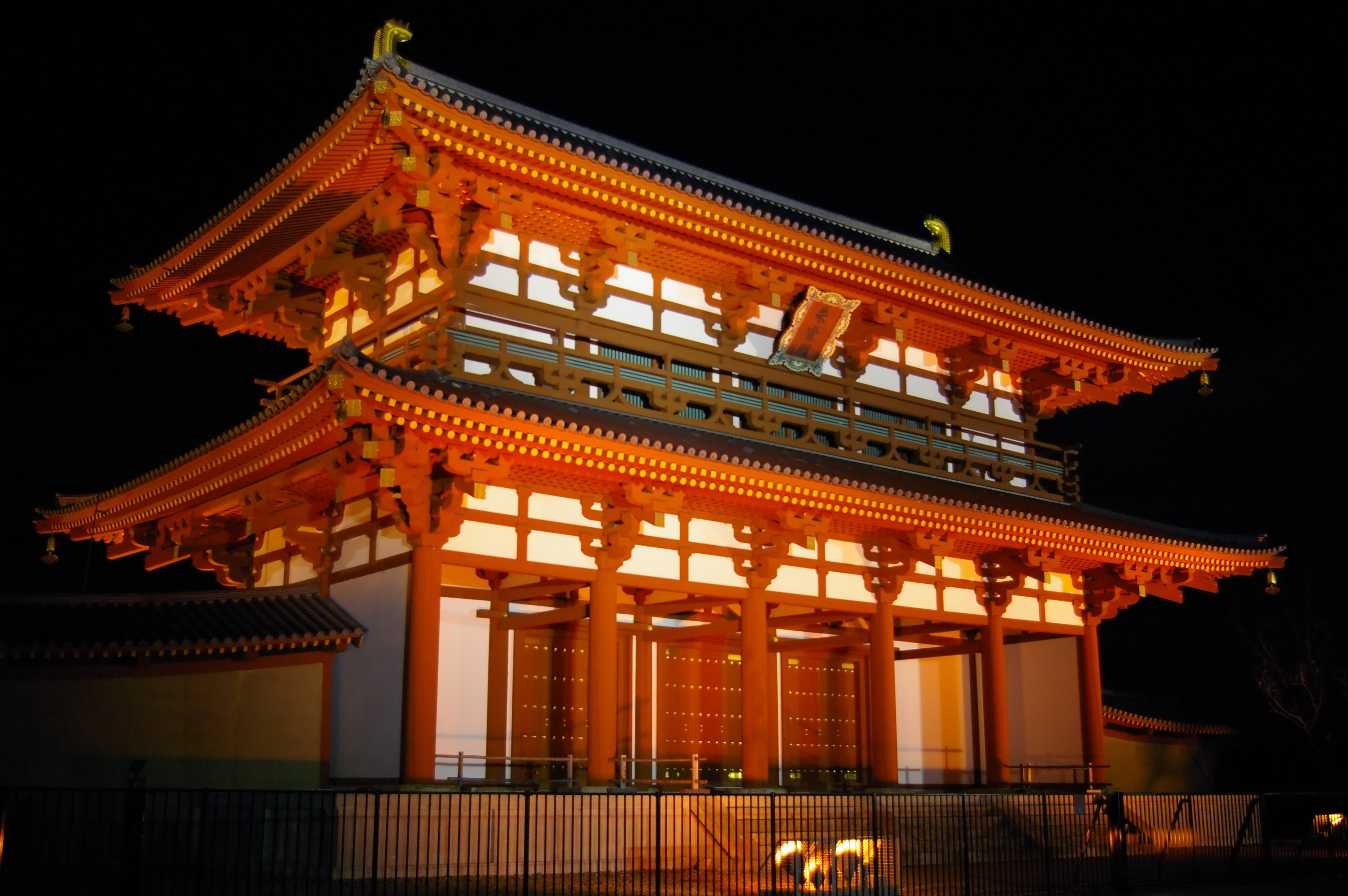 Suzakumon_Heijokyo